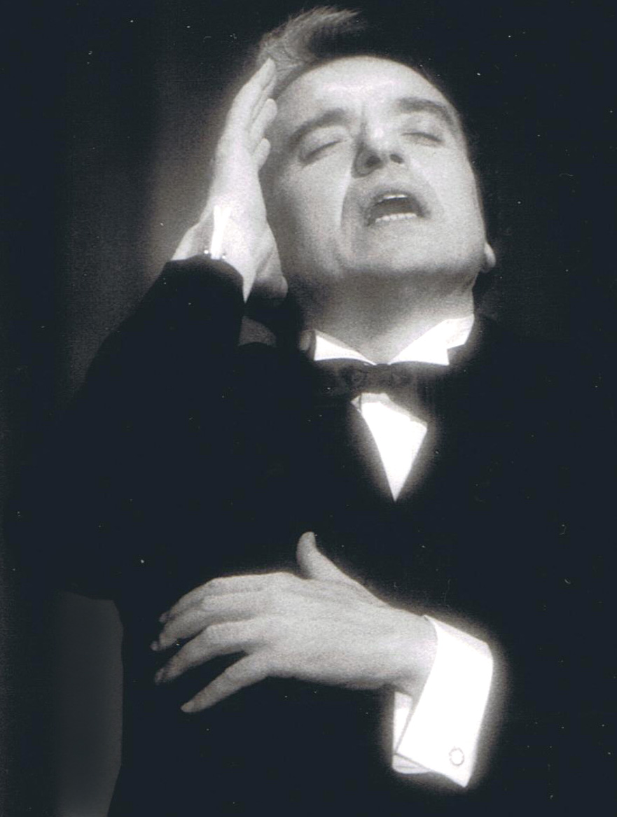 Ruggero Raimondi lors d'un concert à Paris, 1982.